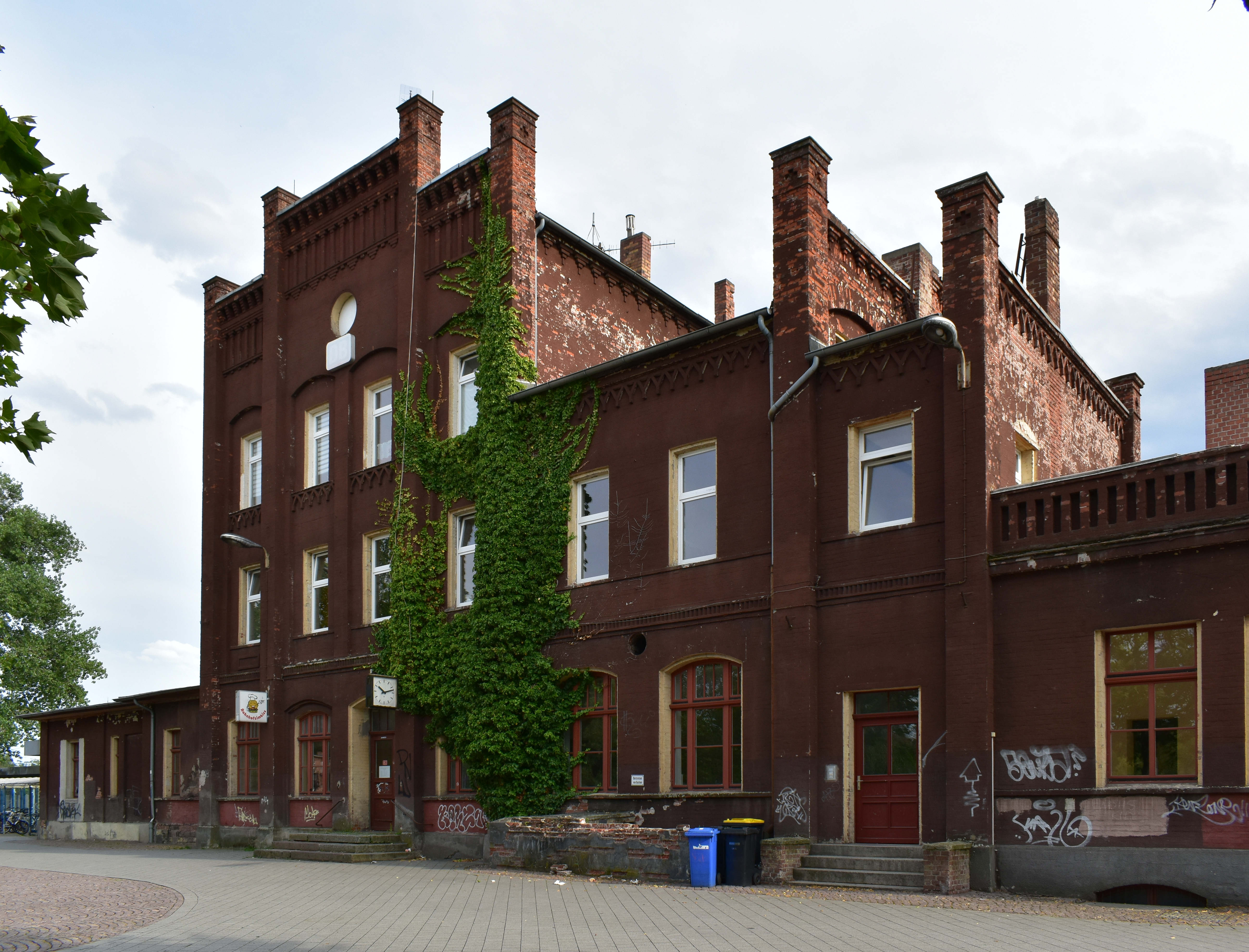 Genthiner Hauptbahnhof